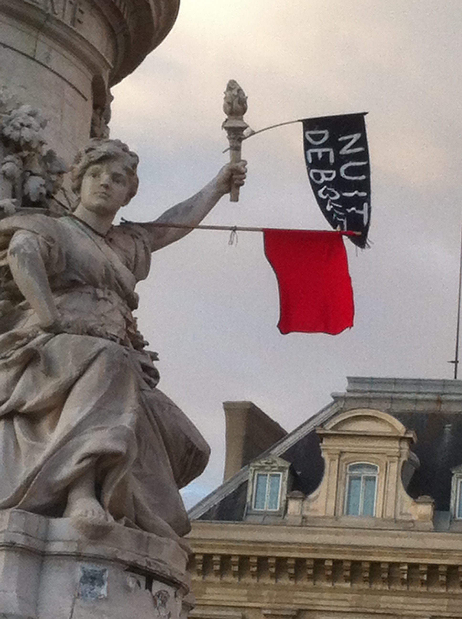 Décoration d'une des statues (Liberté) de la place de la République, à Paris, pour appeler à la Nuit debout, March 31, 2016.